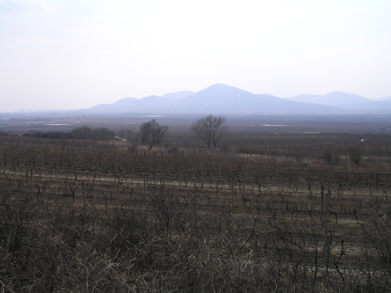 wiev of slovak tokaj wineyard